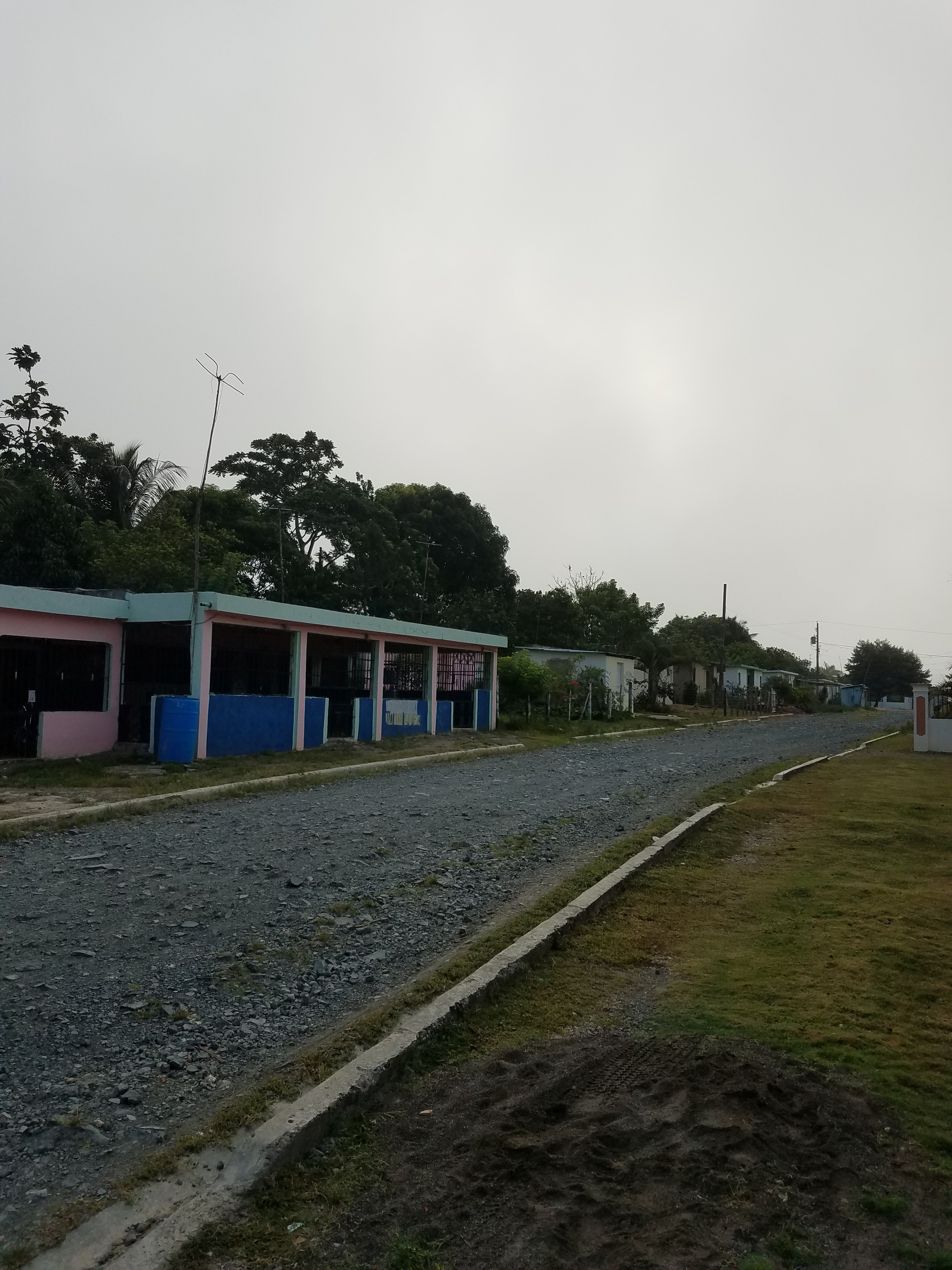 Calle Duarte, Principal. Entrada a la Pista, Republica Dominicana